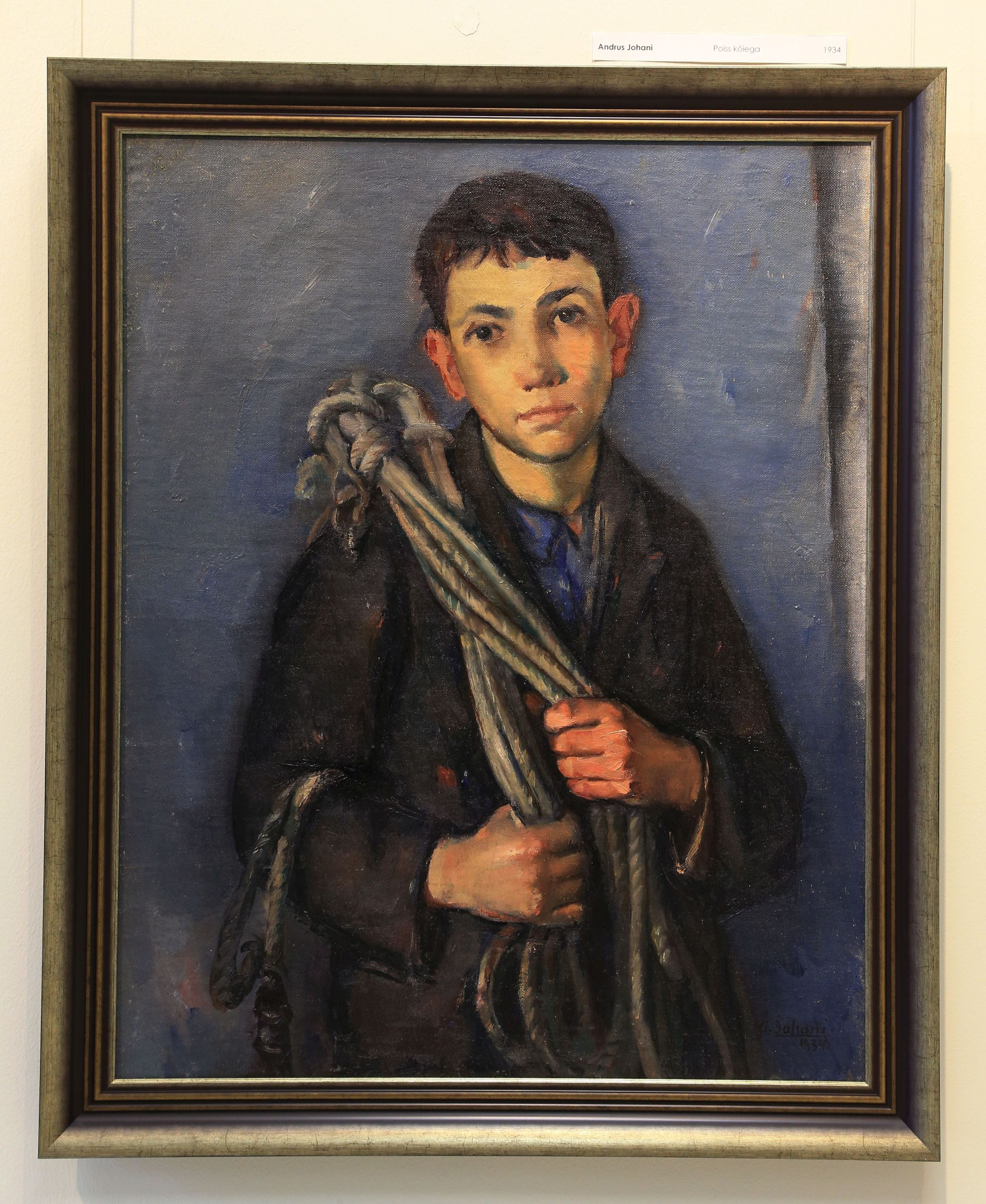 Andrus Johani õlimaal Poiss Köiega 1939